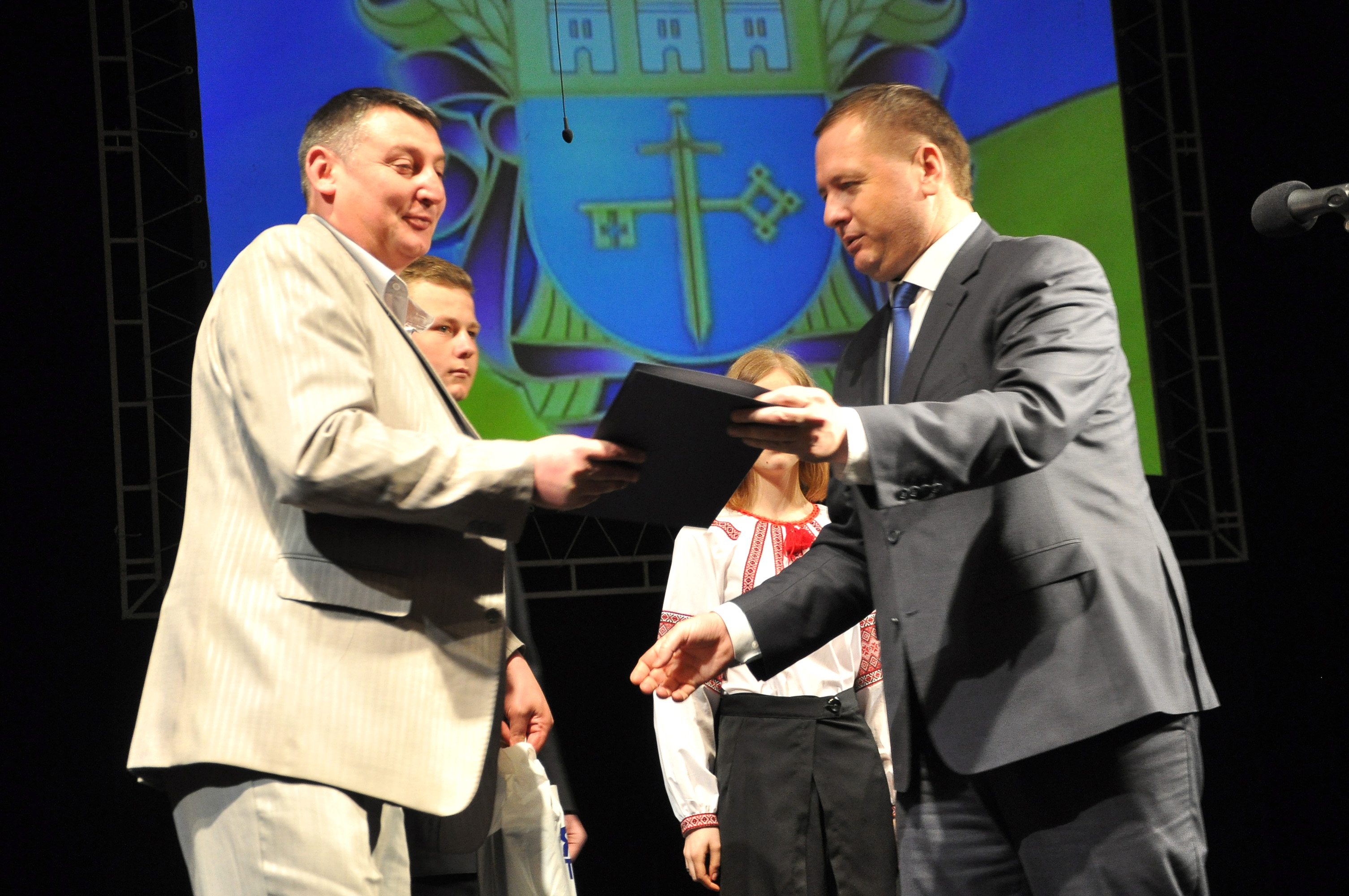 Голова Тернопільської обласної ради Василь Хомінець вручає грамоту керівнику редакційно-видавничої групи Вікторові Уніяту під час презентації книги «Тернопільщина. Історія міст і сіл», яка відбулася 15 травня 2015 року в Тернопільському академічному обласному драматичному театрі ім. Т. Г. Шевченка.